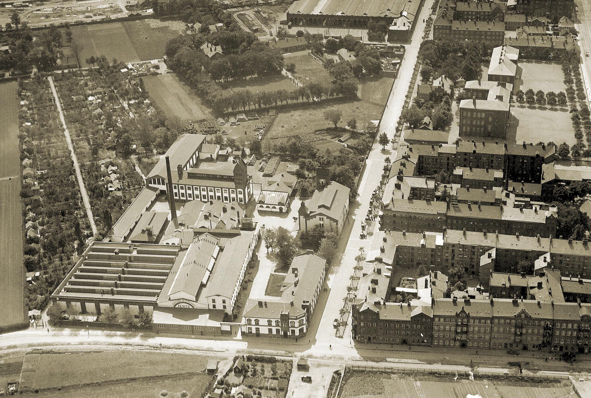 Flygfoto över Zeniths margarinfabrik i Sorgenfri. Området för Malmös gamla avrättningsplats i bakgrunden.